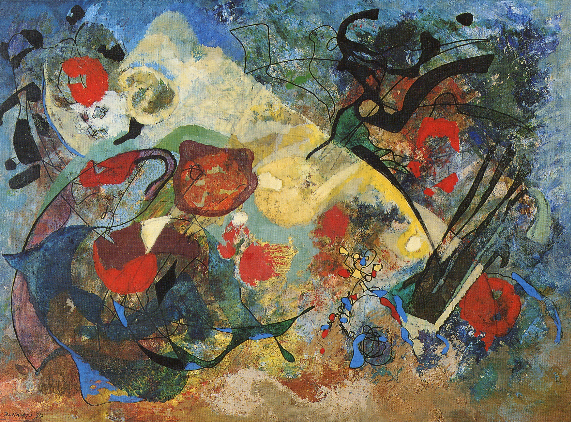 Wilhelm Imkamp "Ohne Titel"